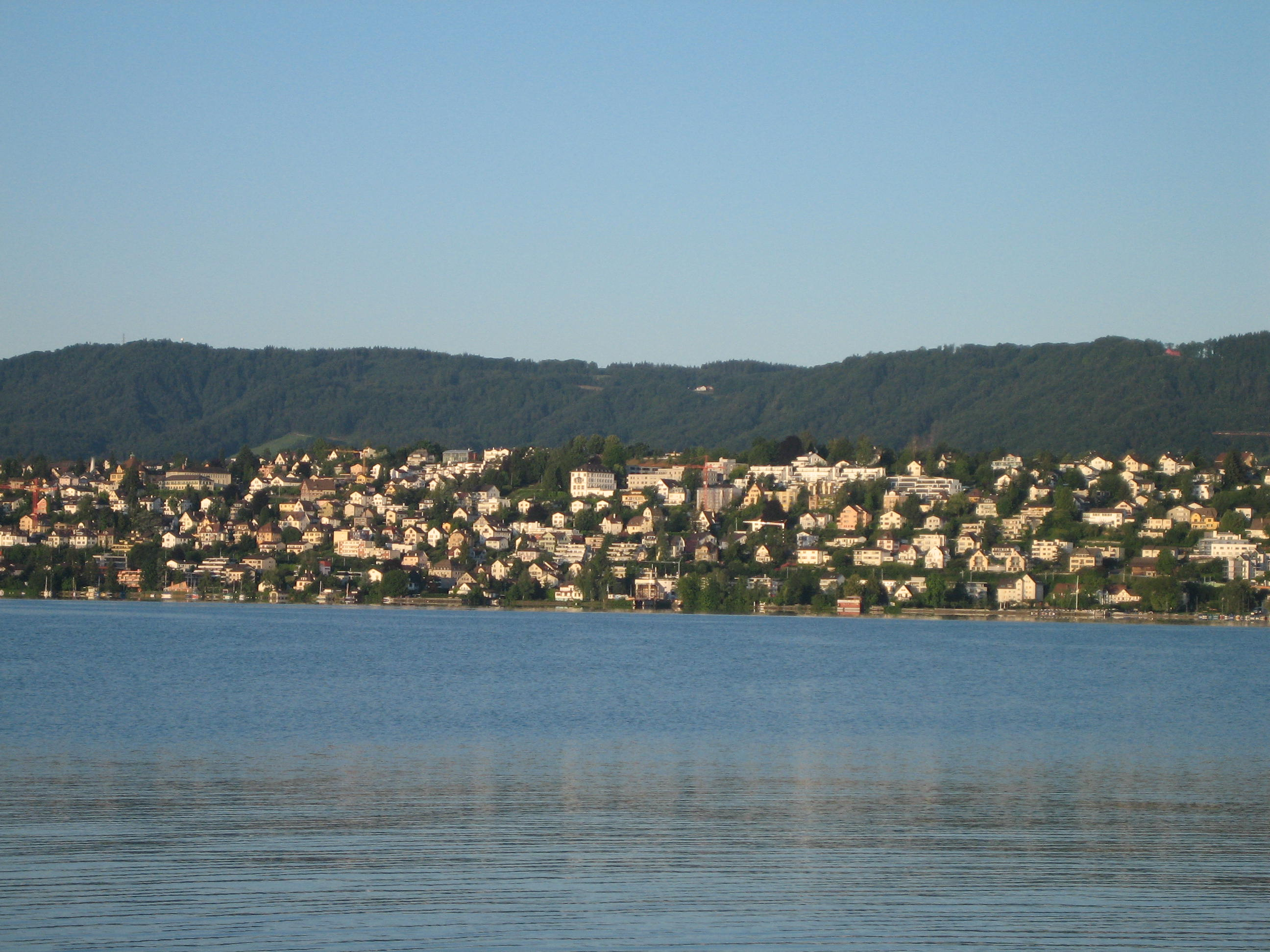 Kilchberg von Zollikon aus gesehen